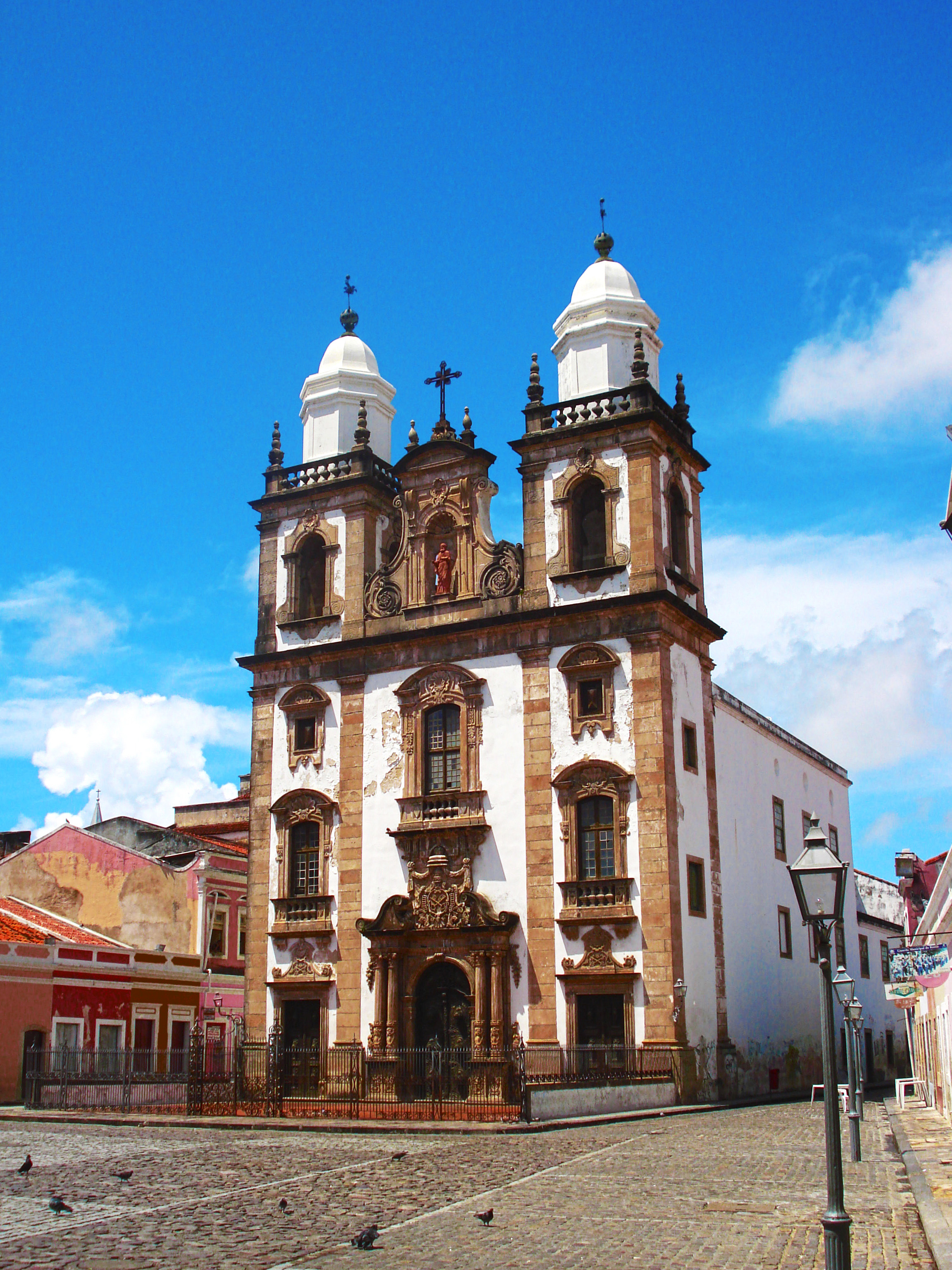 Igreja de São Pedro dos Clérigos e Pátio de São Pedro: conjunto arquitetônico